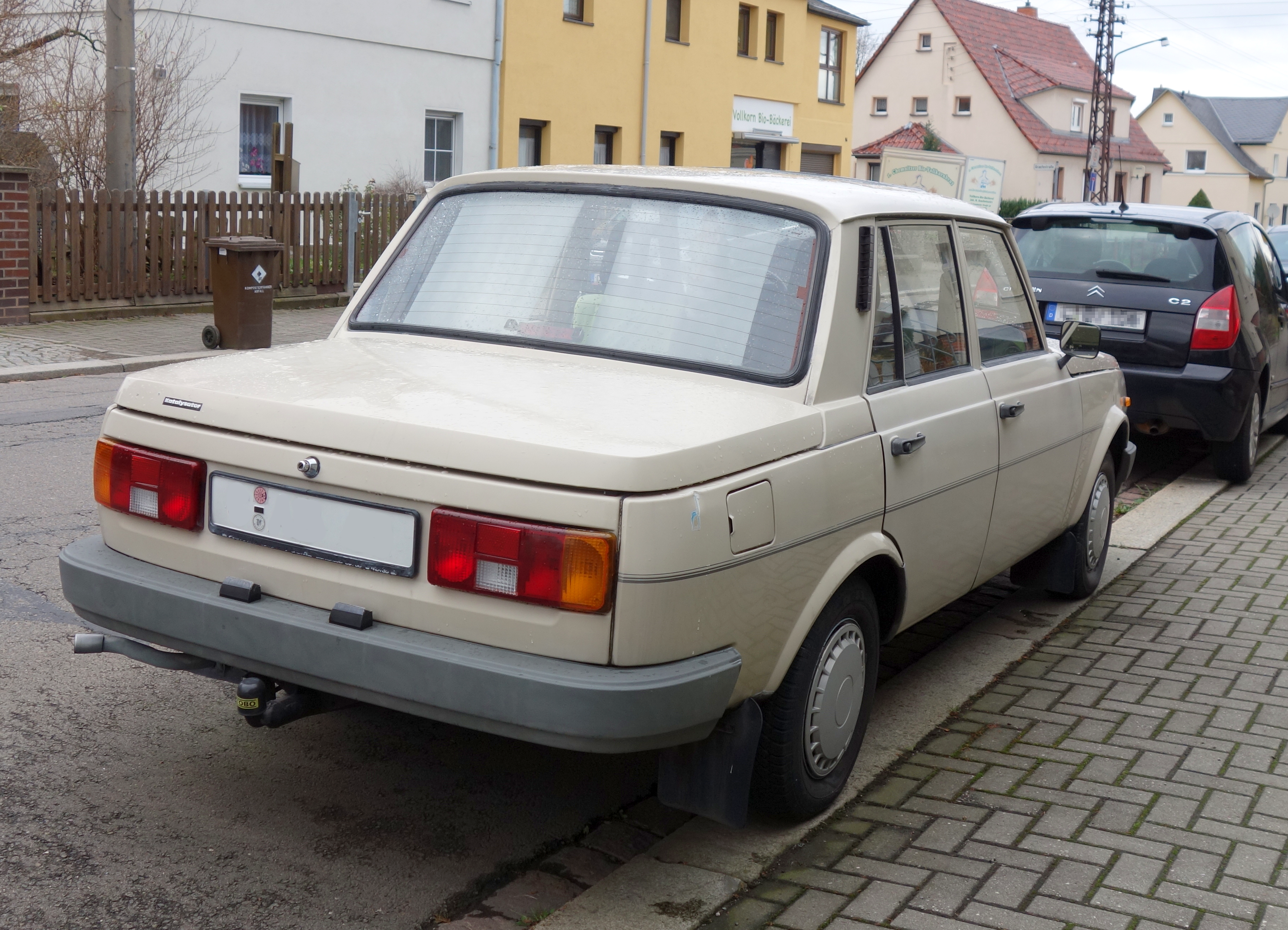 Noch im Alltagseinsatz befindlicher Wartburg 1.3 in Chemnitz (2015).